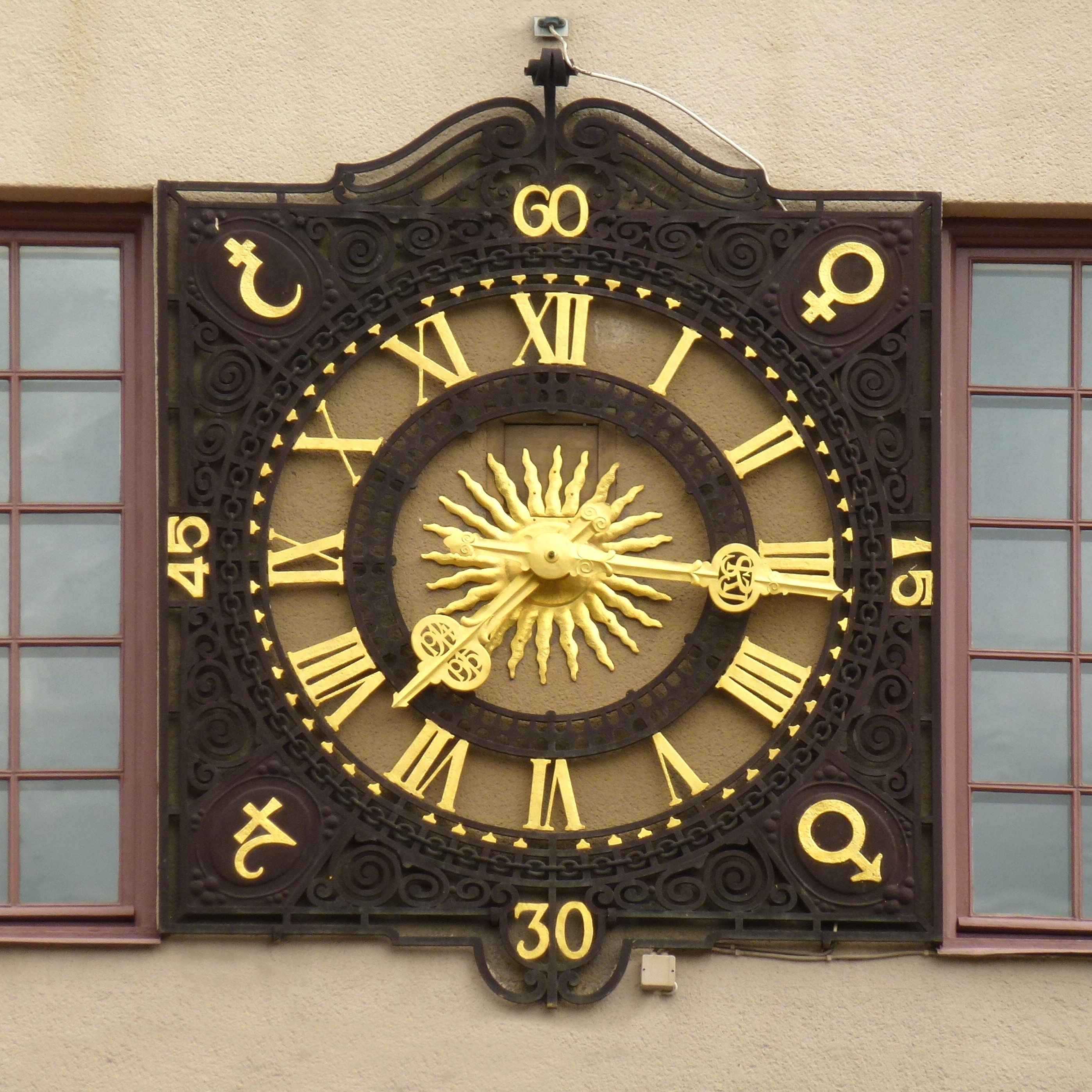 Engelbrektsplan 2 byggnadsur (stationsur för SRJ) från 1915, urverket är av fabrikat Linderoth